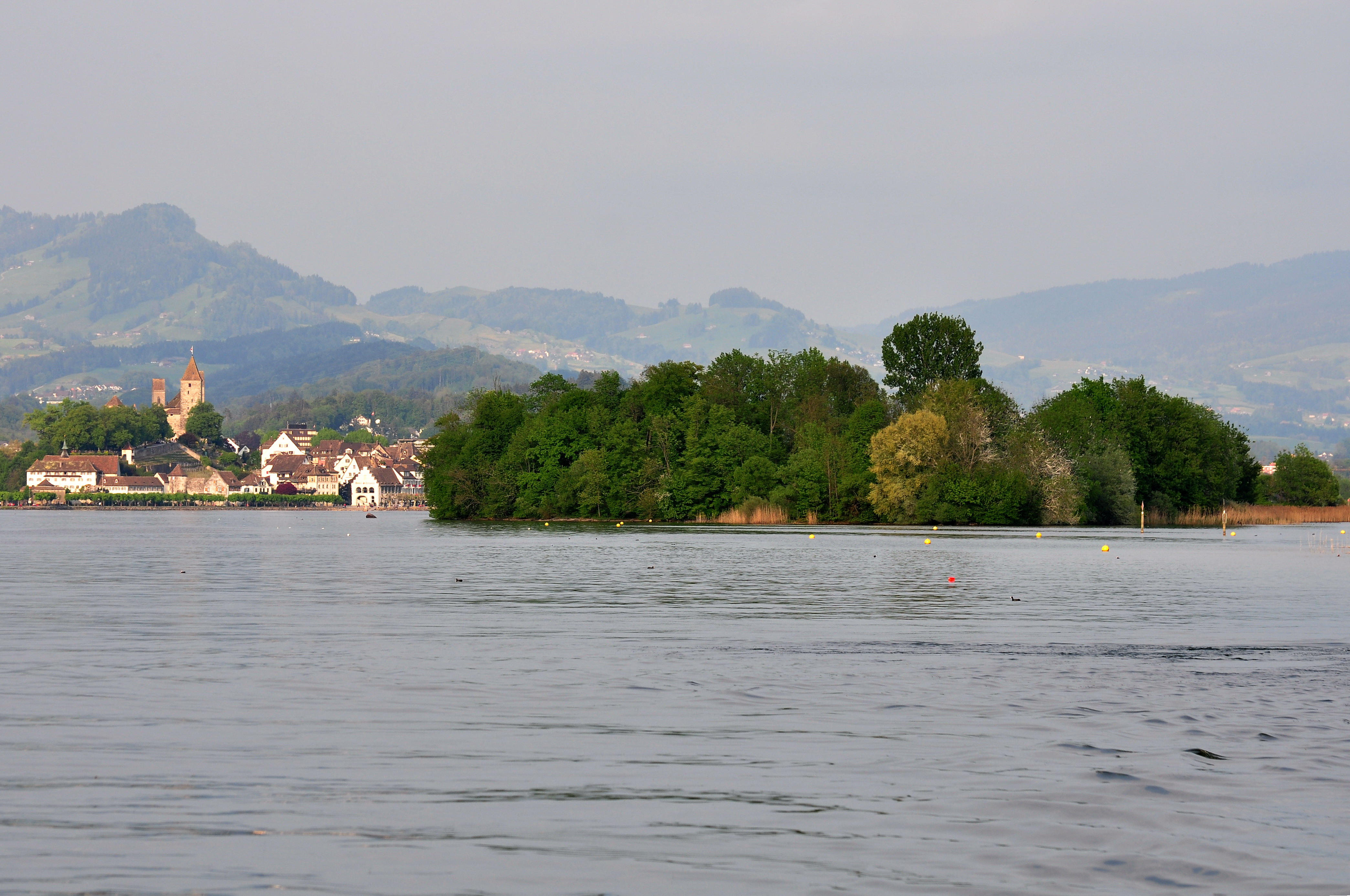 Rapperswil and Lützelau island in Switzerland as seen from Zürichsee-Schifffahrtsgesellschaft (ZSG) motorship MS Limmat on Zürichsee